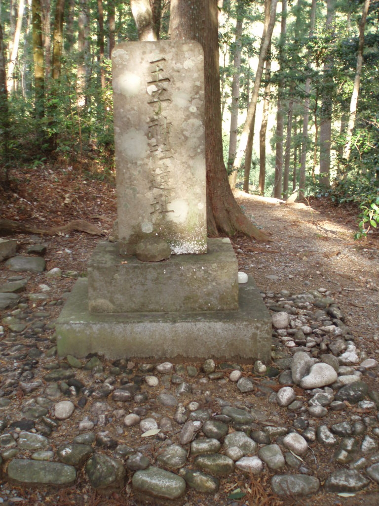 HOSSHINMON-oji shrine